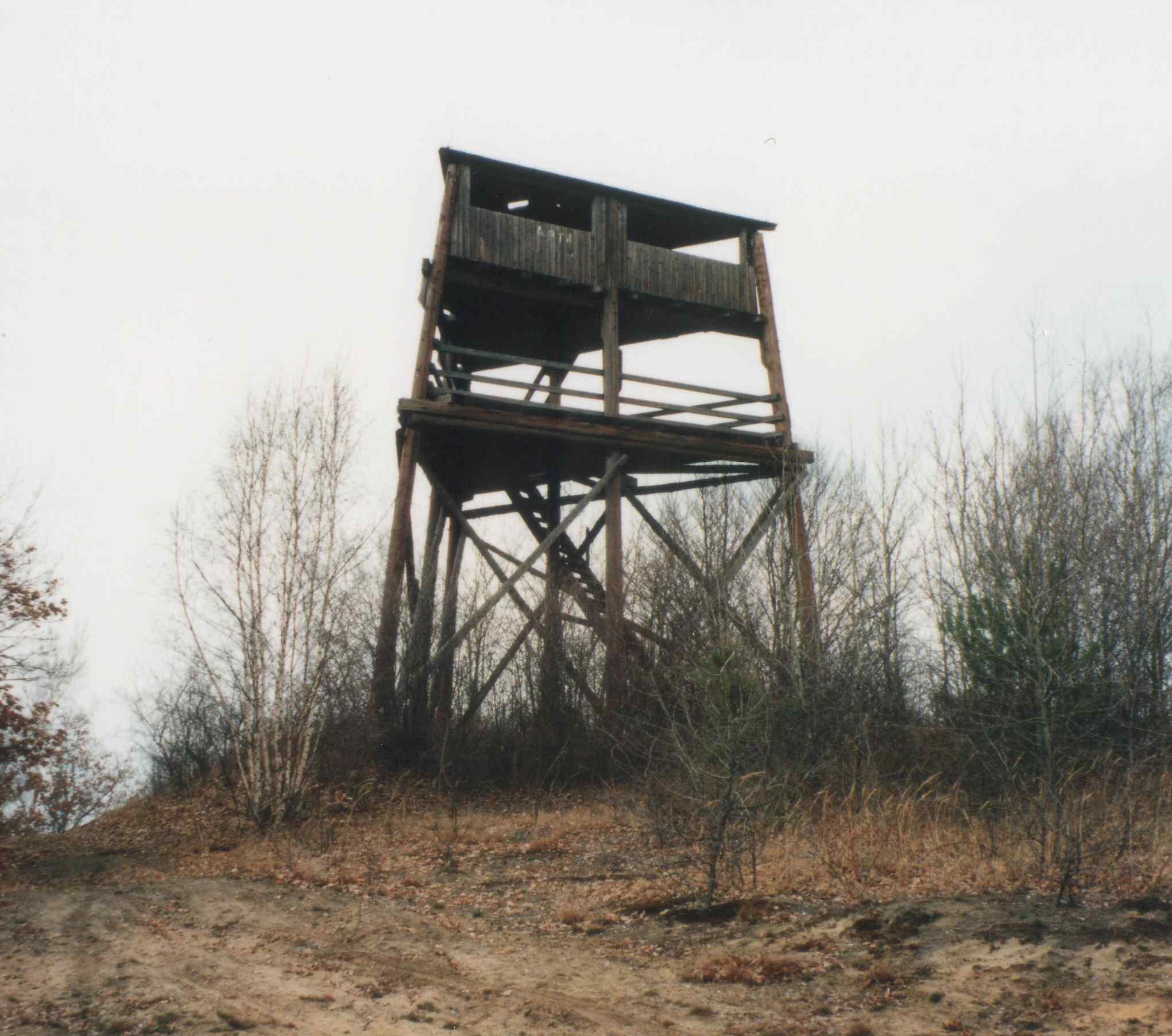 Turmberg bei Hohenleipisch März 1995